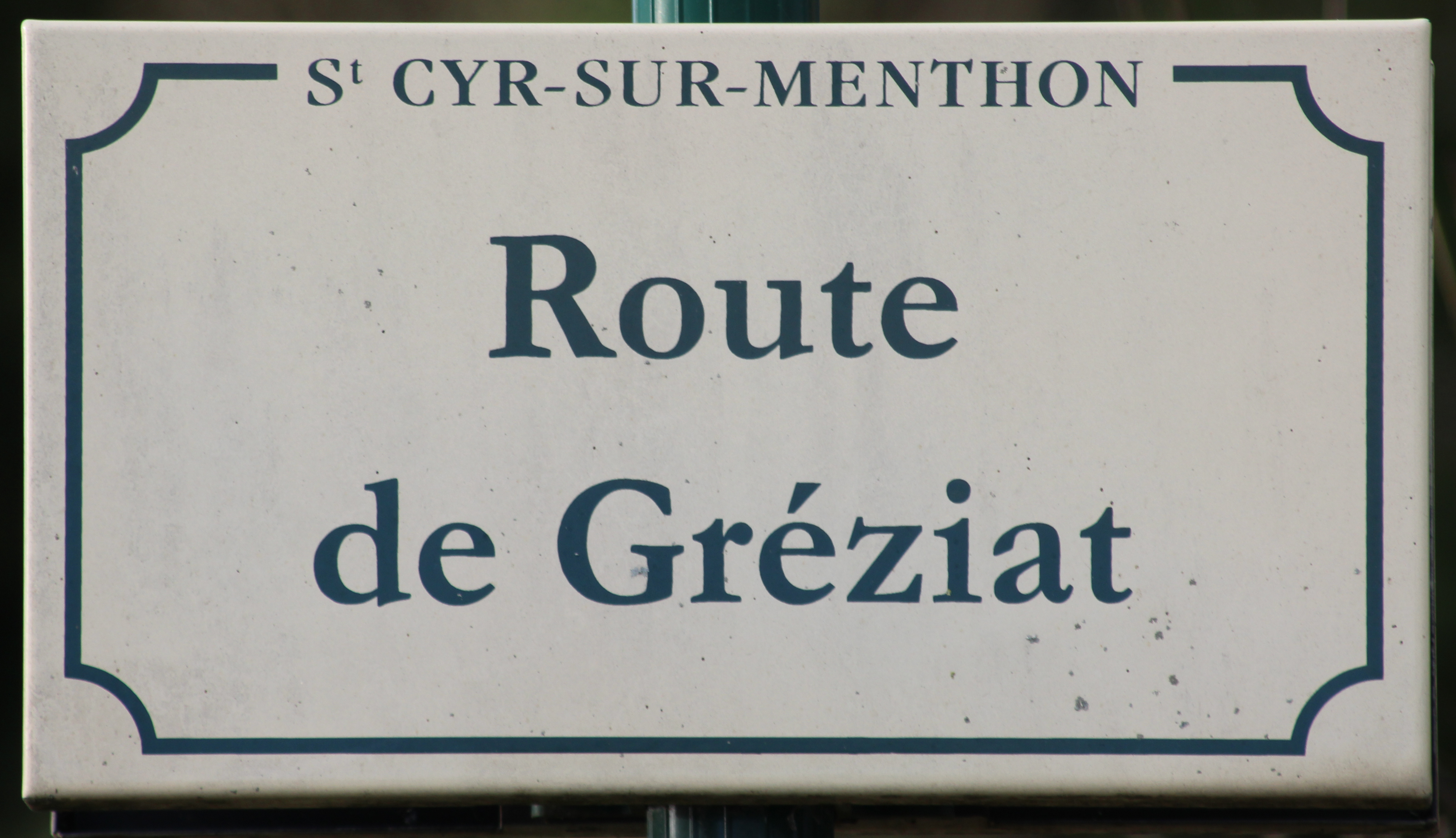 Plaque de la route de Gréziat, Saint-Cyr-sur-Menthon.